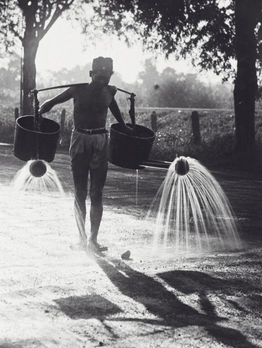 Foto. Deze afbeelding is mogelijk van een kalender (uit 1929 of 1930) geknipt, de foto is vermoedelijk decennia eerder gemaakt.. Het met watergieters besproeien van de weg, Nederlands-Indië